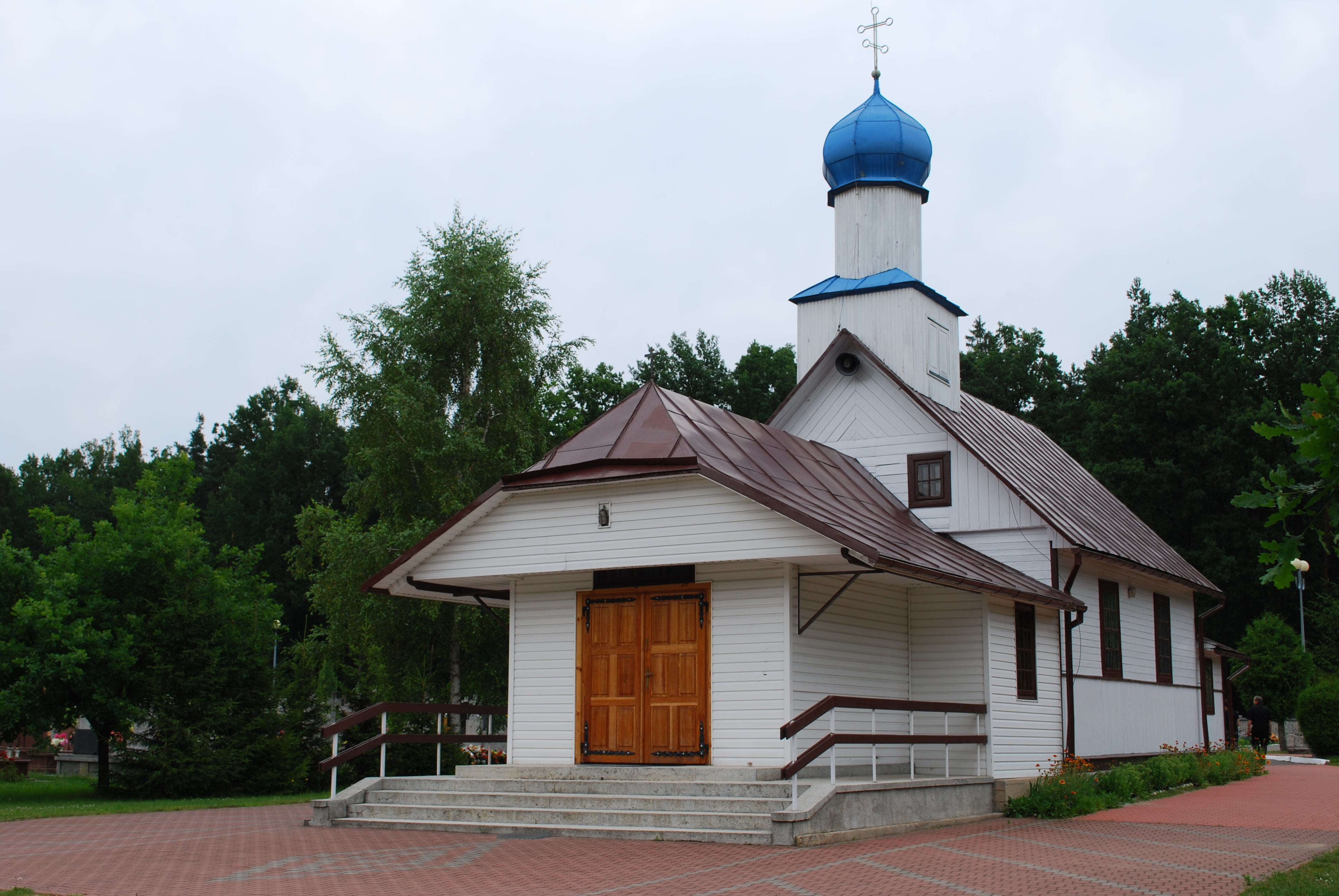 Cerkiew cmentarna w Hajnówce. This photo from Podlaskie Voievodeship was taken during Polish Wikiexpedition 2009 set up by Wikimedia Polska Association. The making of this document was supported by Wikimedia Polska.